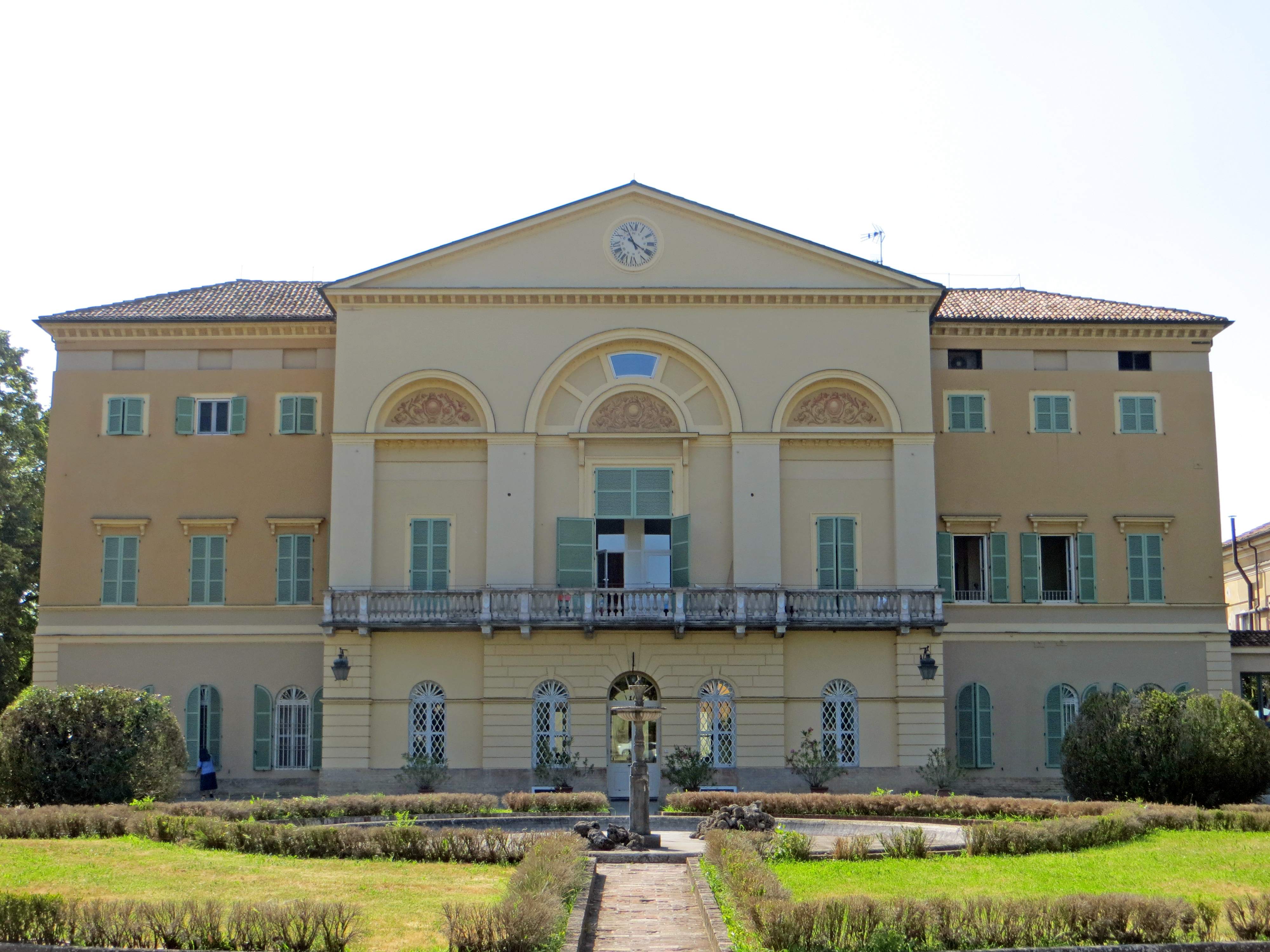 Villa Avogadro (Parma) - facciata